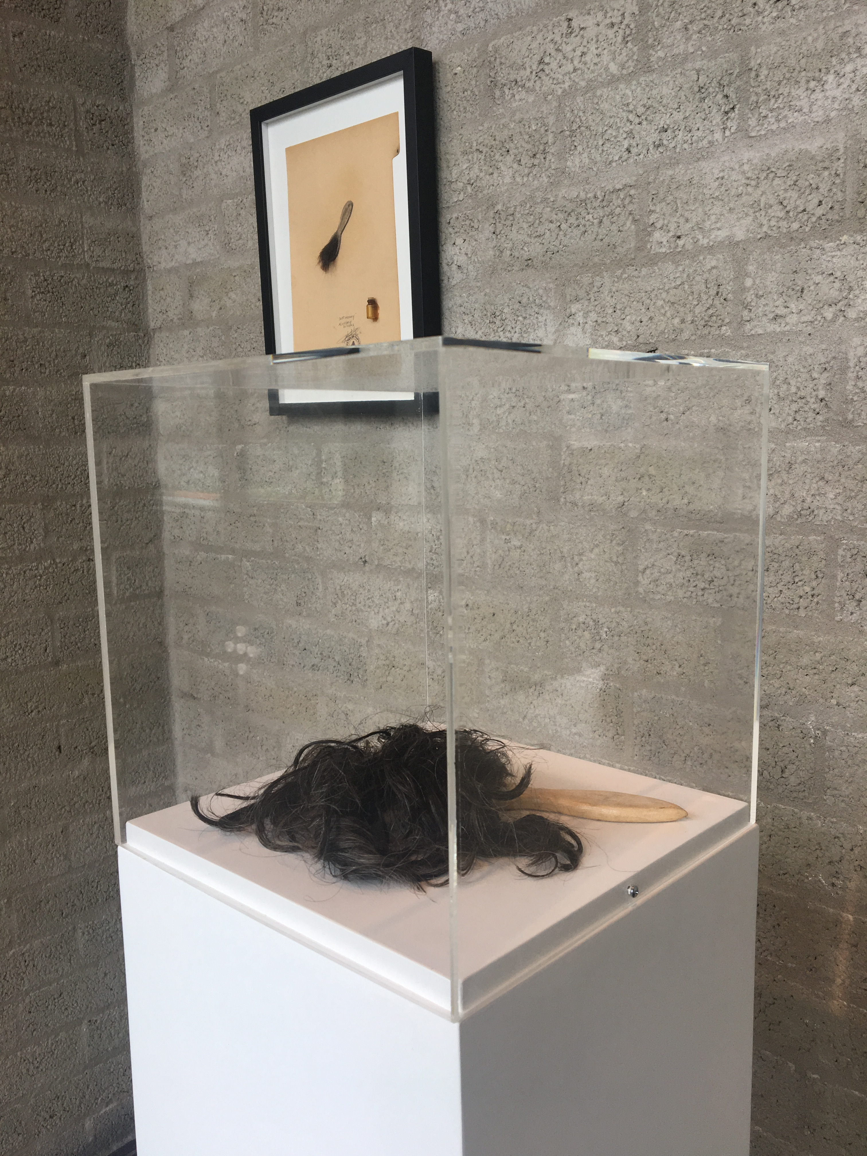 Olfactory artwork by Peter De Cupere. Hair brush with real hair that belonged to survivors of WWII and gunpowder scent.